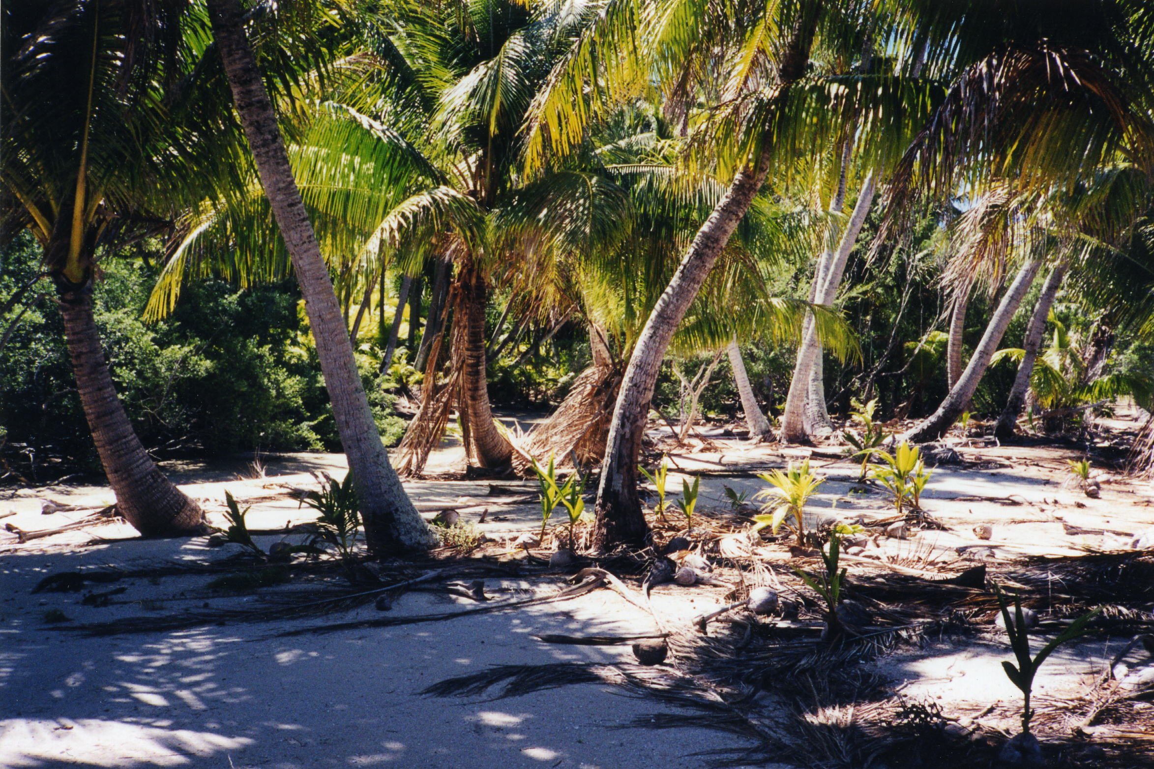 Ein Motu des Rangiroa-Atolls, Tumamotu-Archipel, Französisch-Polynesien